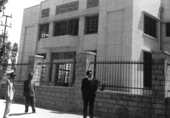 تصویری قدیمی از دبیرستان منصور تبریز